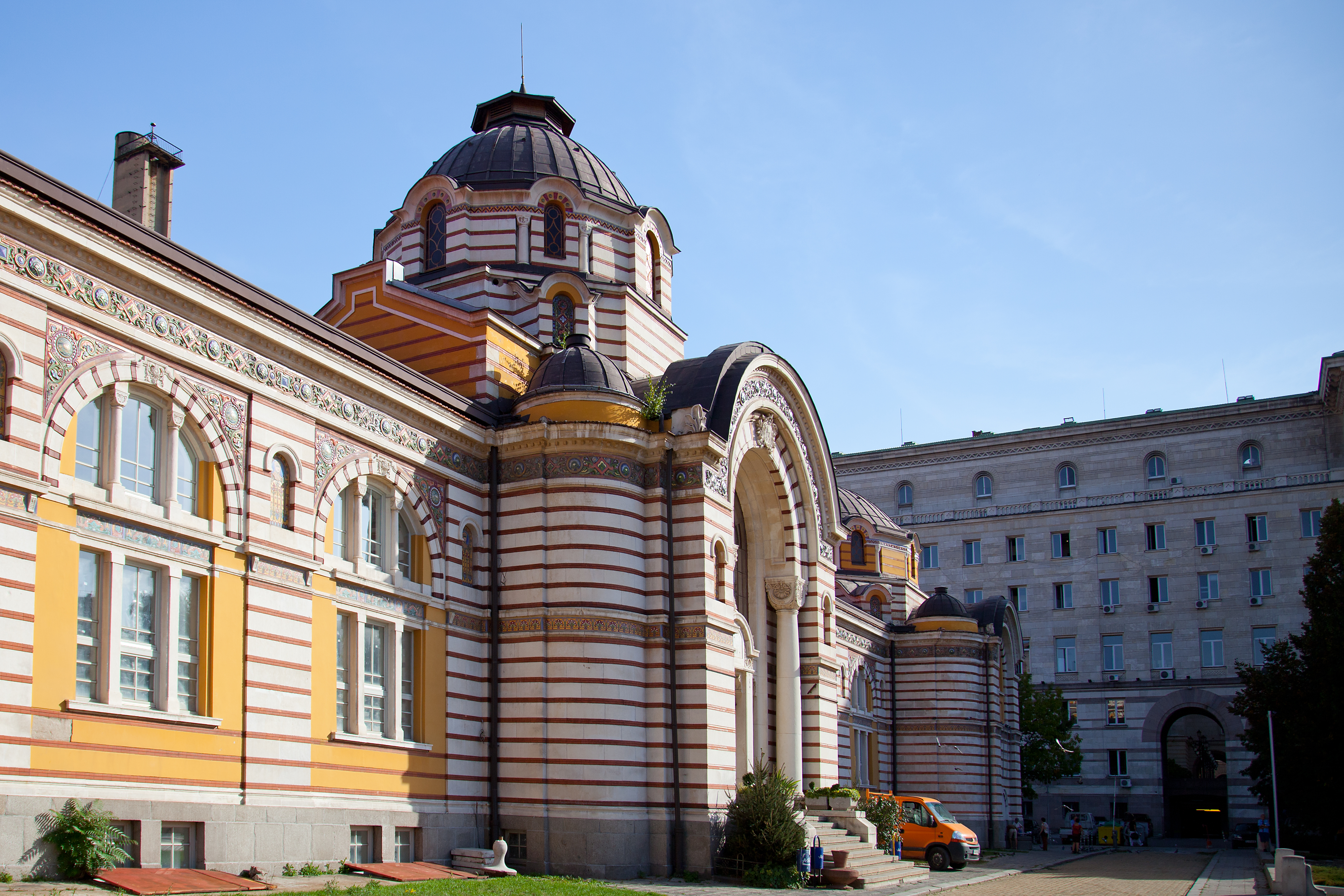 Sofia , Zentrales Mineralbad